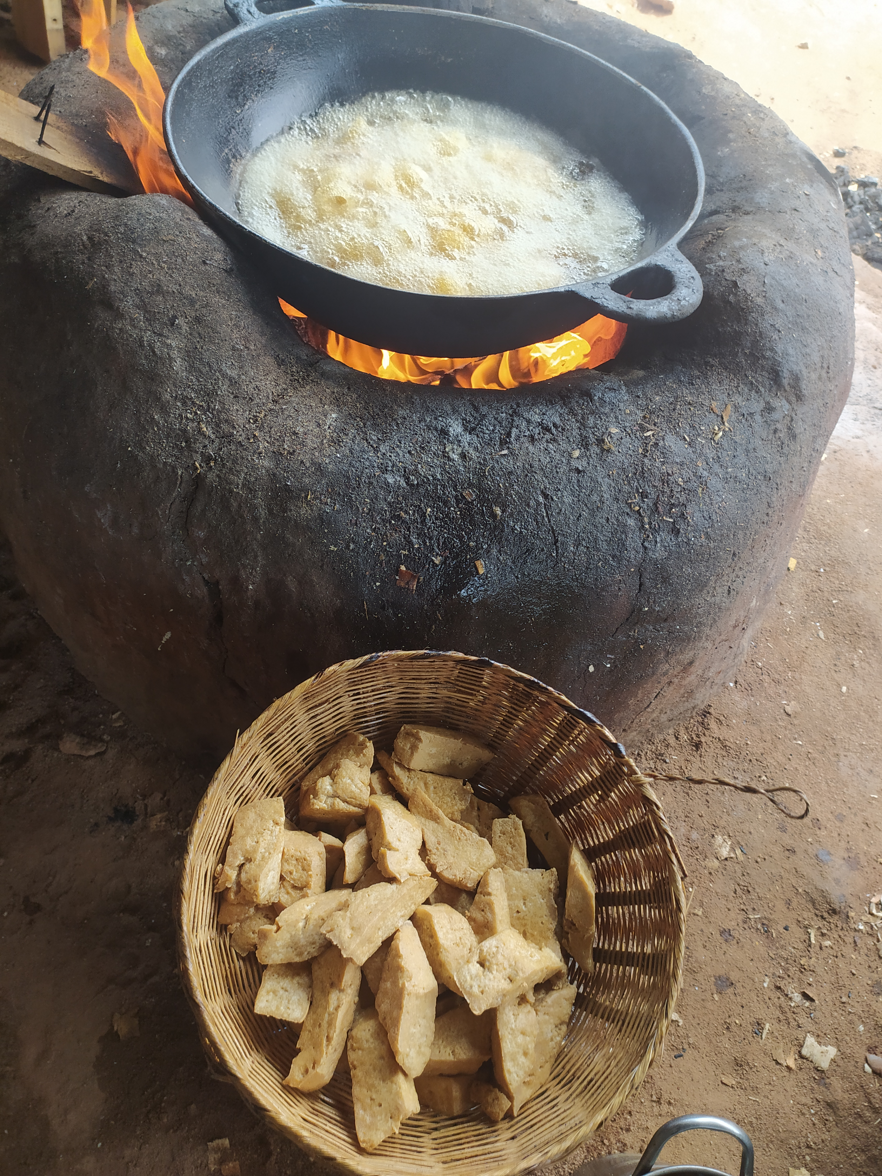 cuisson finale du Amon soja et son extraction dans de l'huile.